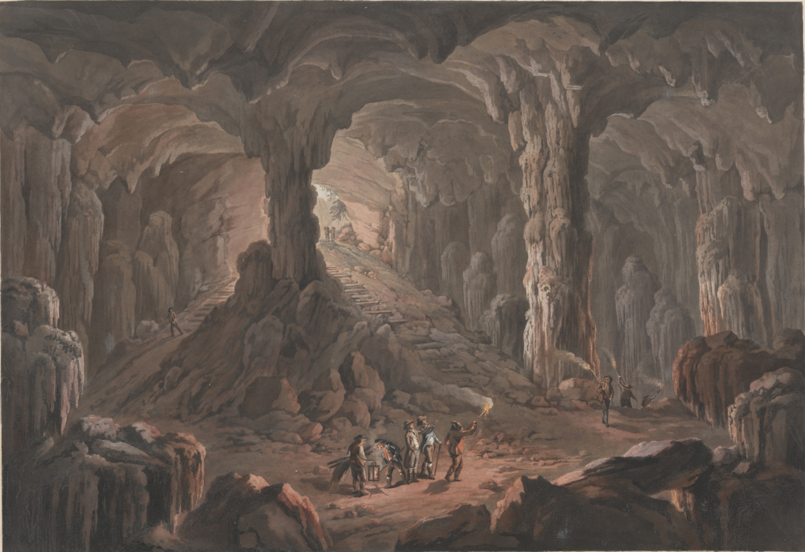 Slovenian: Vilenica